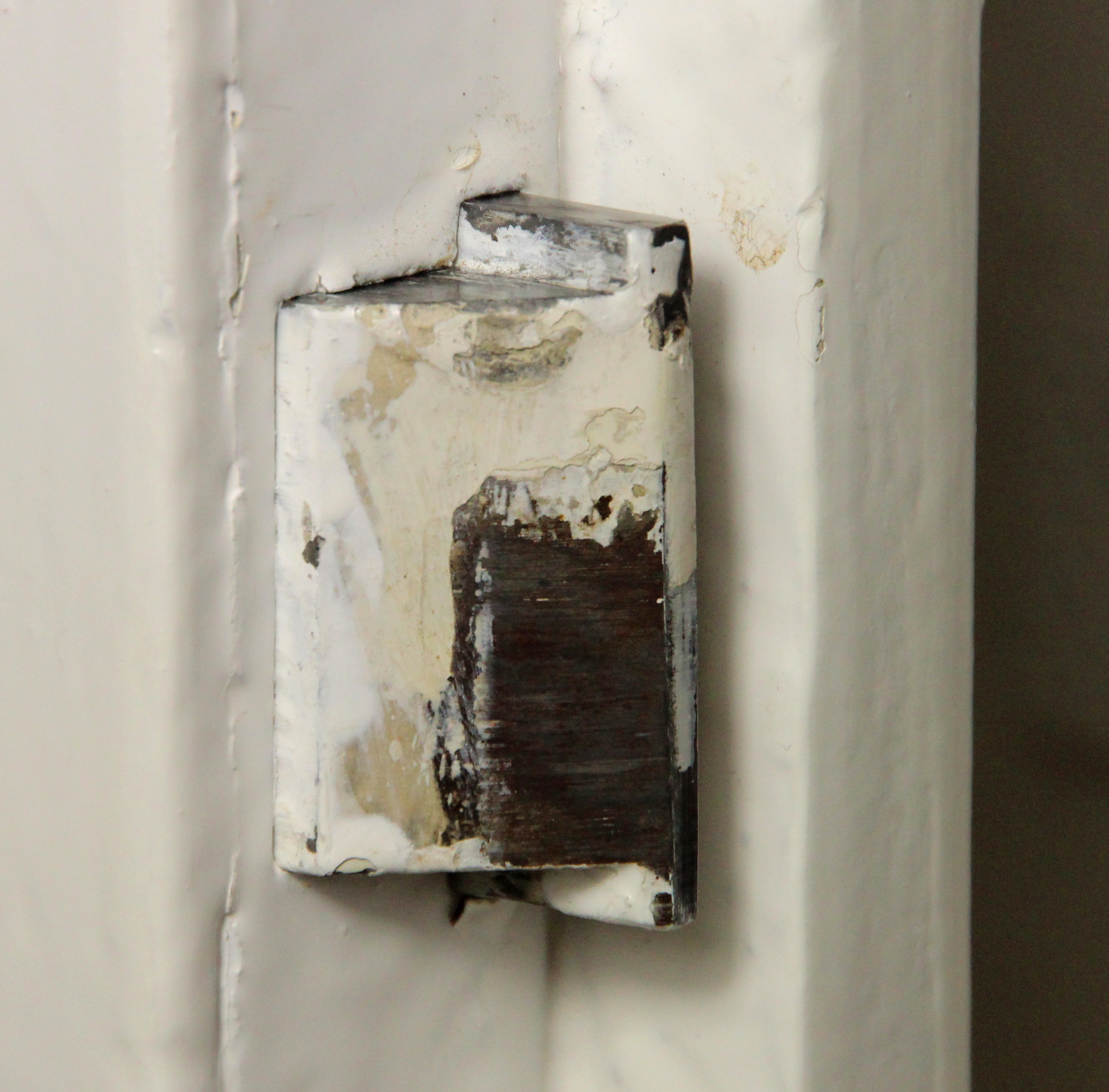 Bildinhalt: Schlossfalle einer weiß gestrichenen Tür Aufnahmeort: Baden-Baden, Deutschland